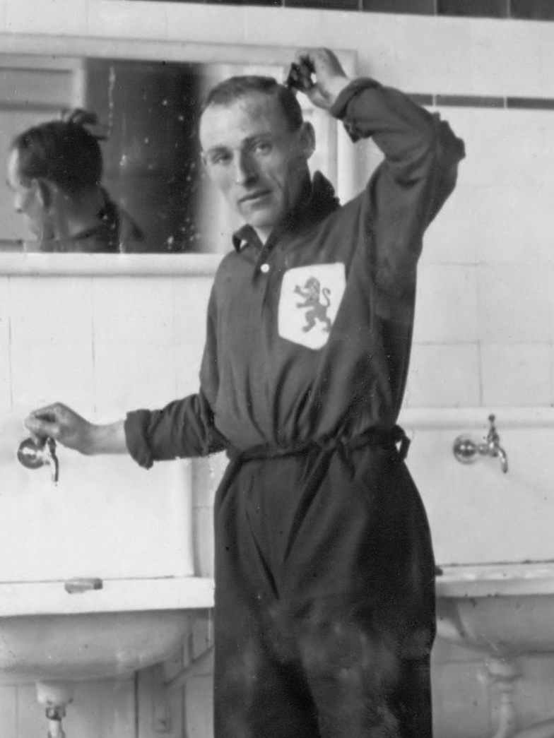 Bertus Bul brengt voor de wedstrijd zijn haar in model. Nederland - Zwitserland (4-1), gespeeld op 25 november 1923 in het Stadion te Amsterdam. 1923